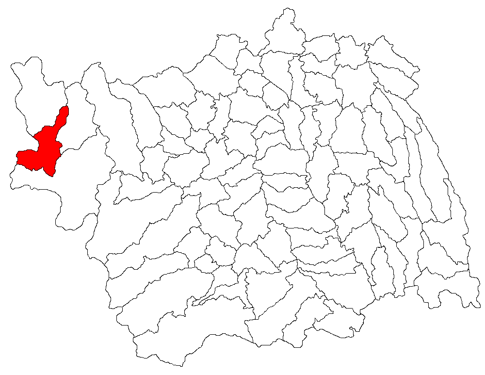 Categorie:Hărţi ale judeţului Bacău